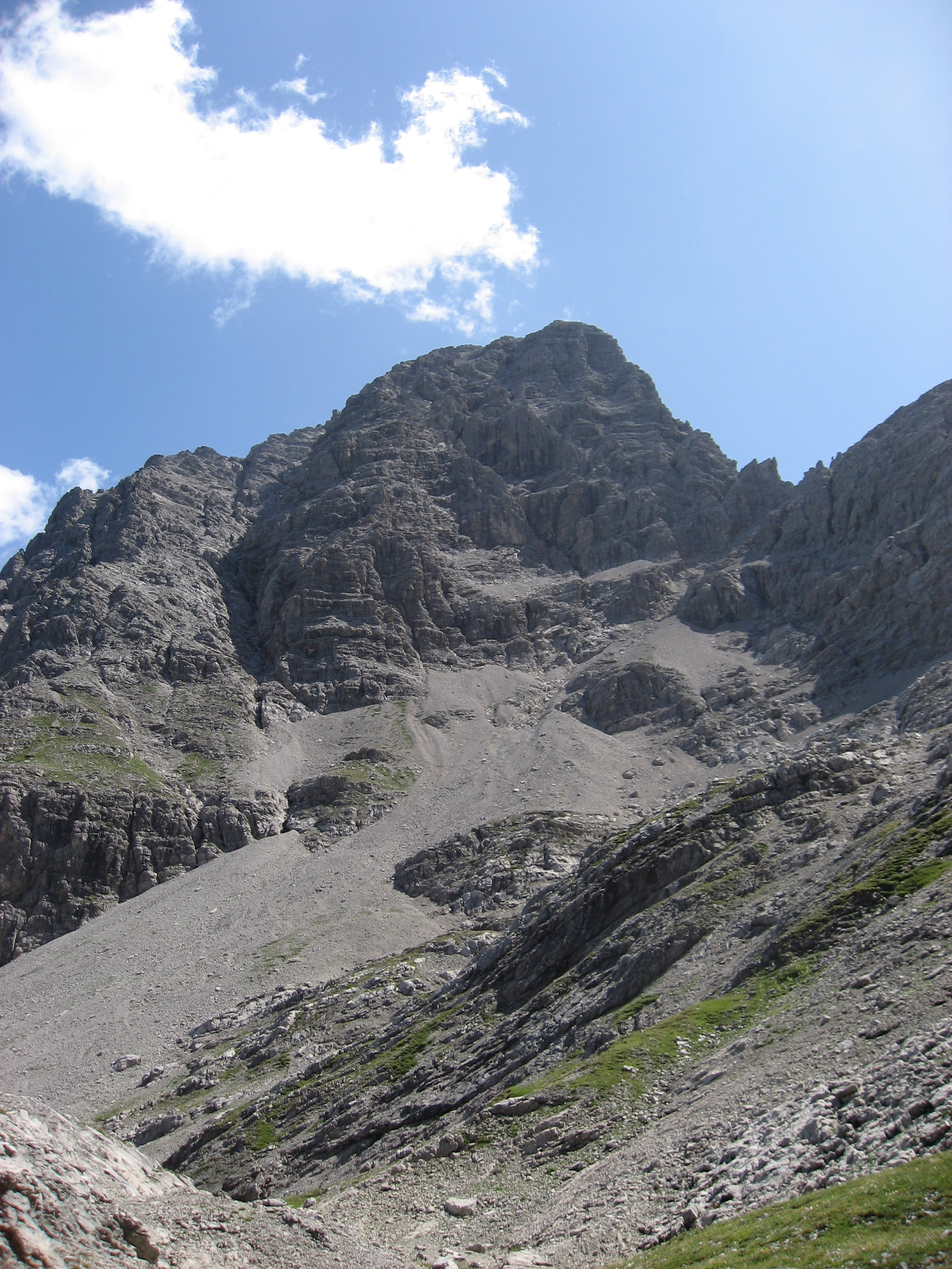 Die Urbeleskarspitze (2632 m) in der Hornbachkette (Tirol) vom Urbeleskar aus gesehen